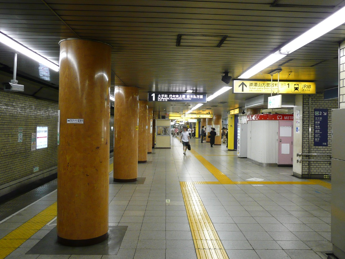 東京地下鉄西日暮里駅1番ホーム